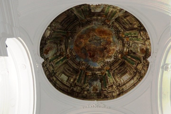 Chiesa di Santa Maria di Costantinopoli di Cerreto Sannita: particolare dell'interno della cupola con degli affreschi del pittore cerretese Domenico Biondi (1905).